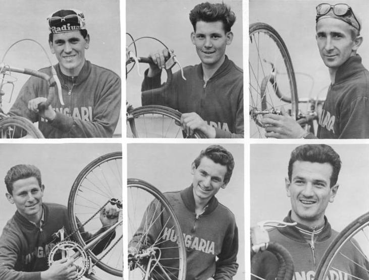 Friedensfahrt, Mannschaft aus Ungarn Zentralbild MTI-Repro Ks-Noa 29.4.1960 - Die Teilnehmer Ungarns an der XIII. Friedensfahrt 1960. UBz: Obere Reihe vlnr: Ferenc Horvath, Joszew Szerenoses, Lojos Arany. Untere Reihe vlnr: Janos Juszko, Antal Megyerdi, Gyözö Török.